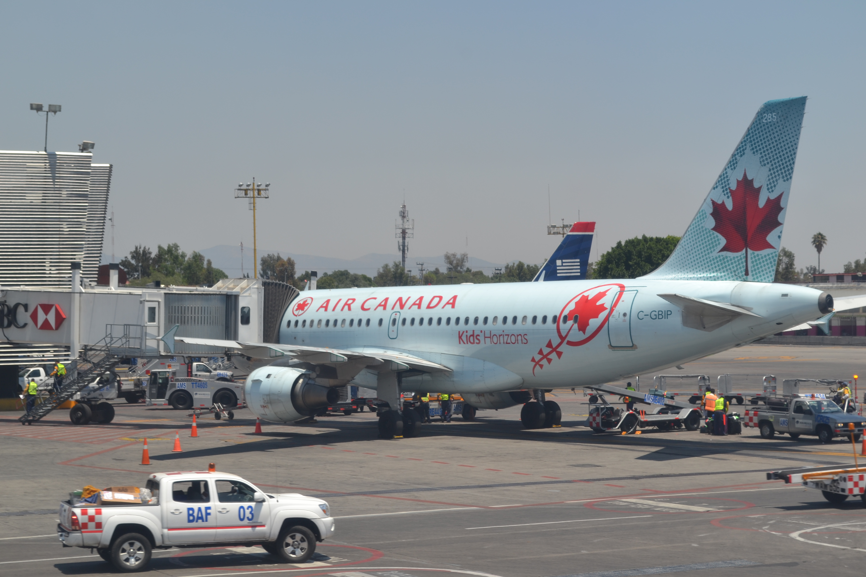 Air Canada en el Aeropuerto Internacional de la Ciudad de México